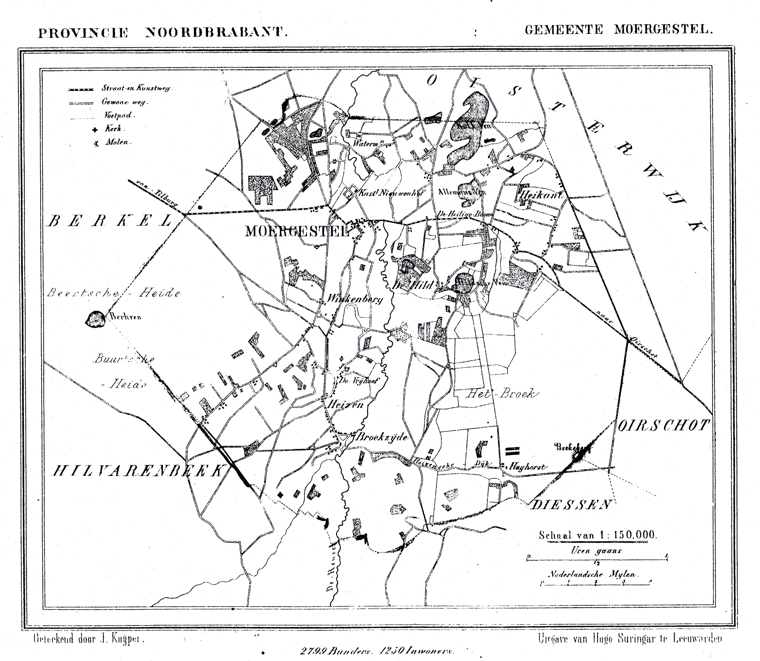 Nederland, Noord-Brabant, Gemeente Moergestel